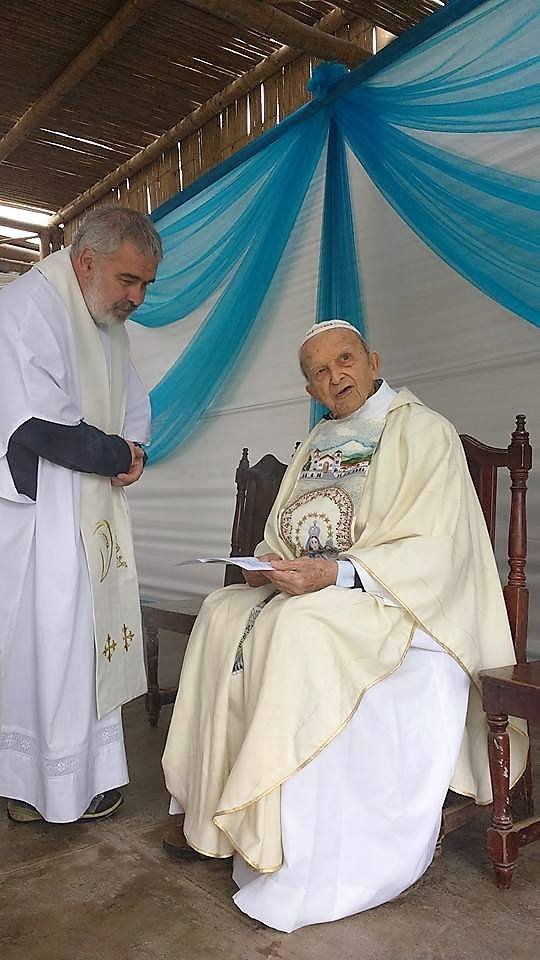 Luca Bergamaschi y Ugo de Censi, párrocos de Chacas.